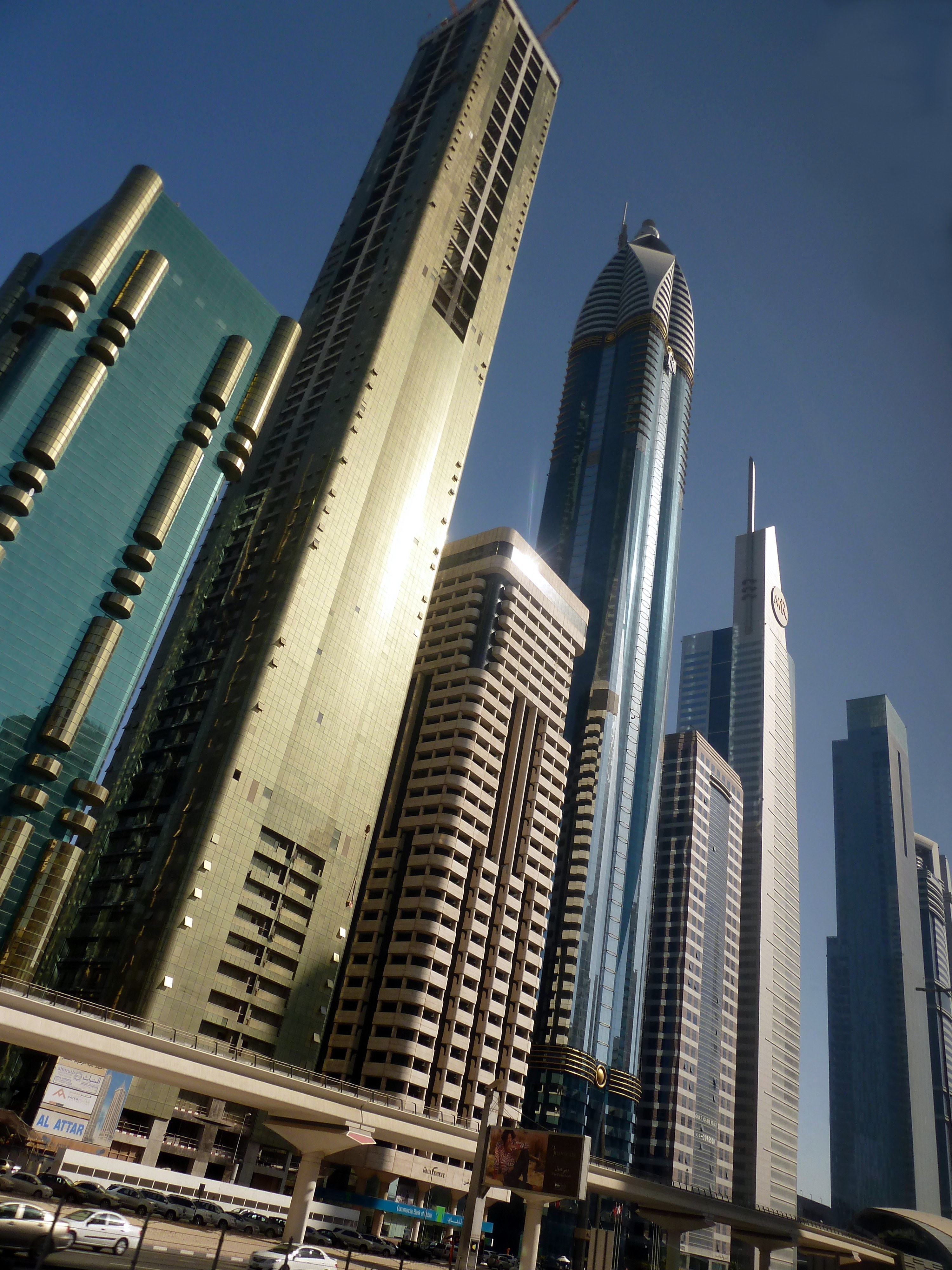 Dubai - 2011-03-23 Sheikh Zayed Road –-- شارع الشيخ زايد --- Die 8 Türme von links: Siehe Kommentar unten